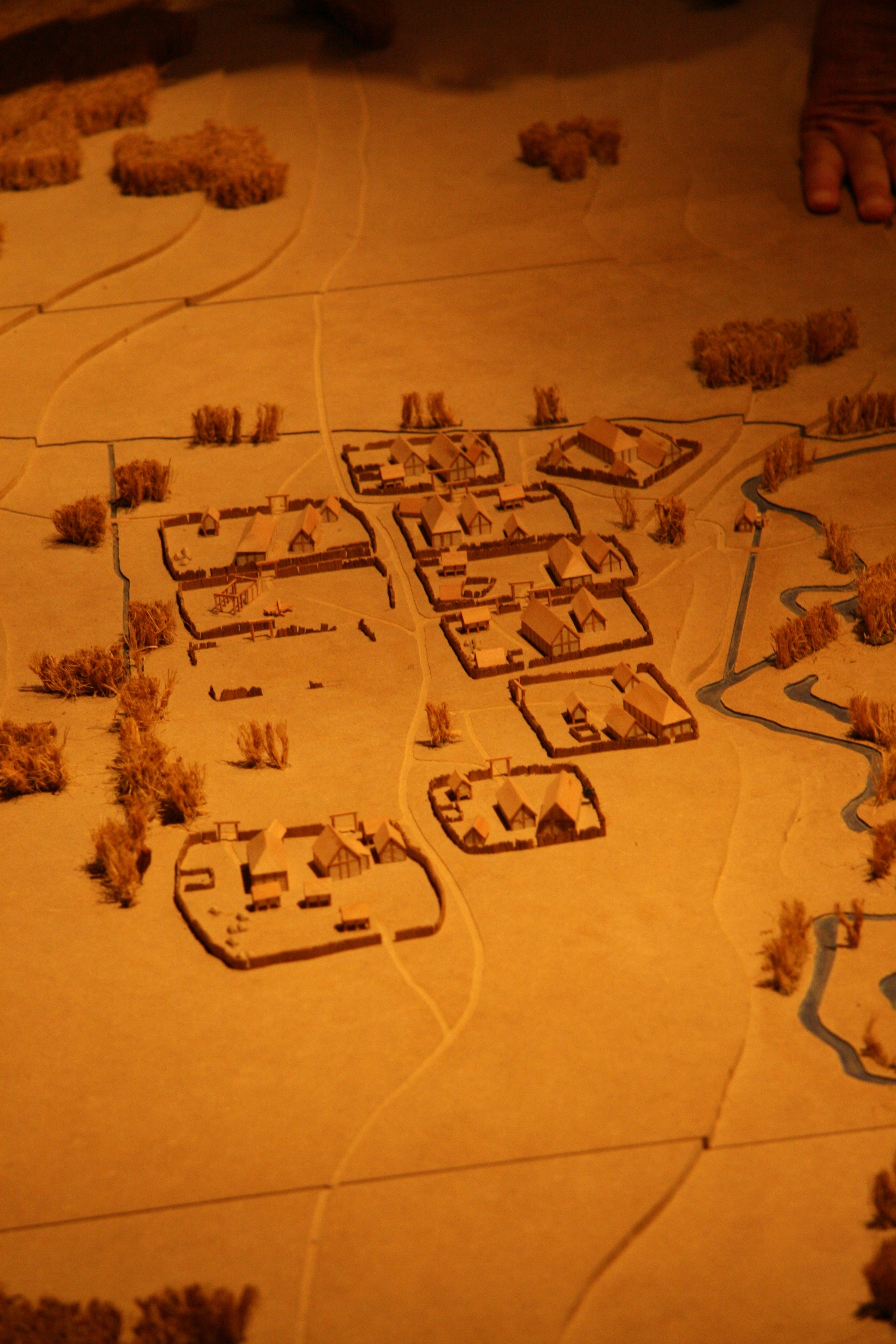 Siedlung der Alamannen